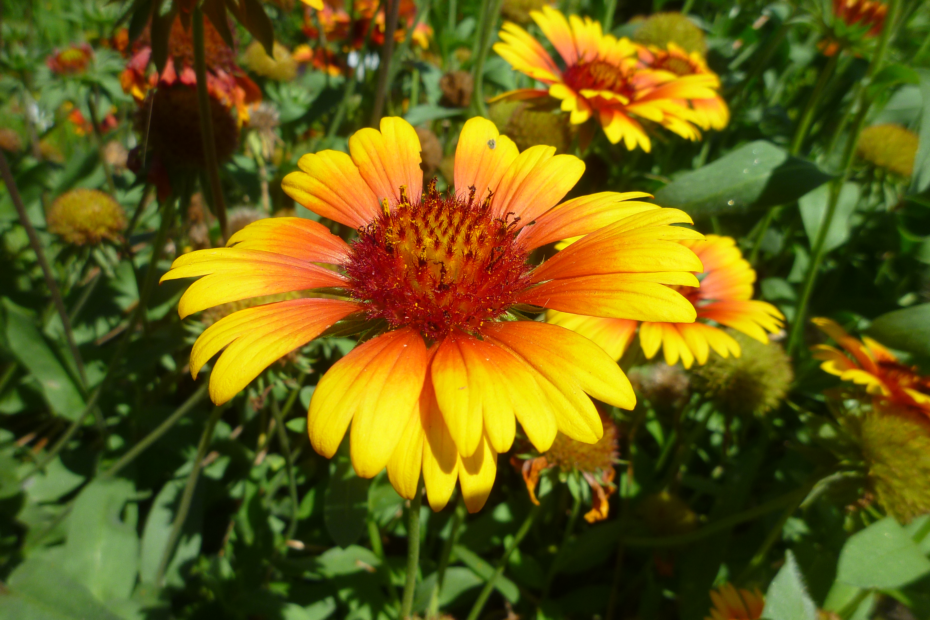 テンニンギク 学名: Gaillardia pulchella